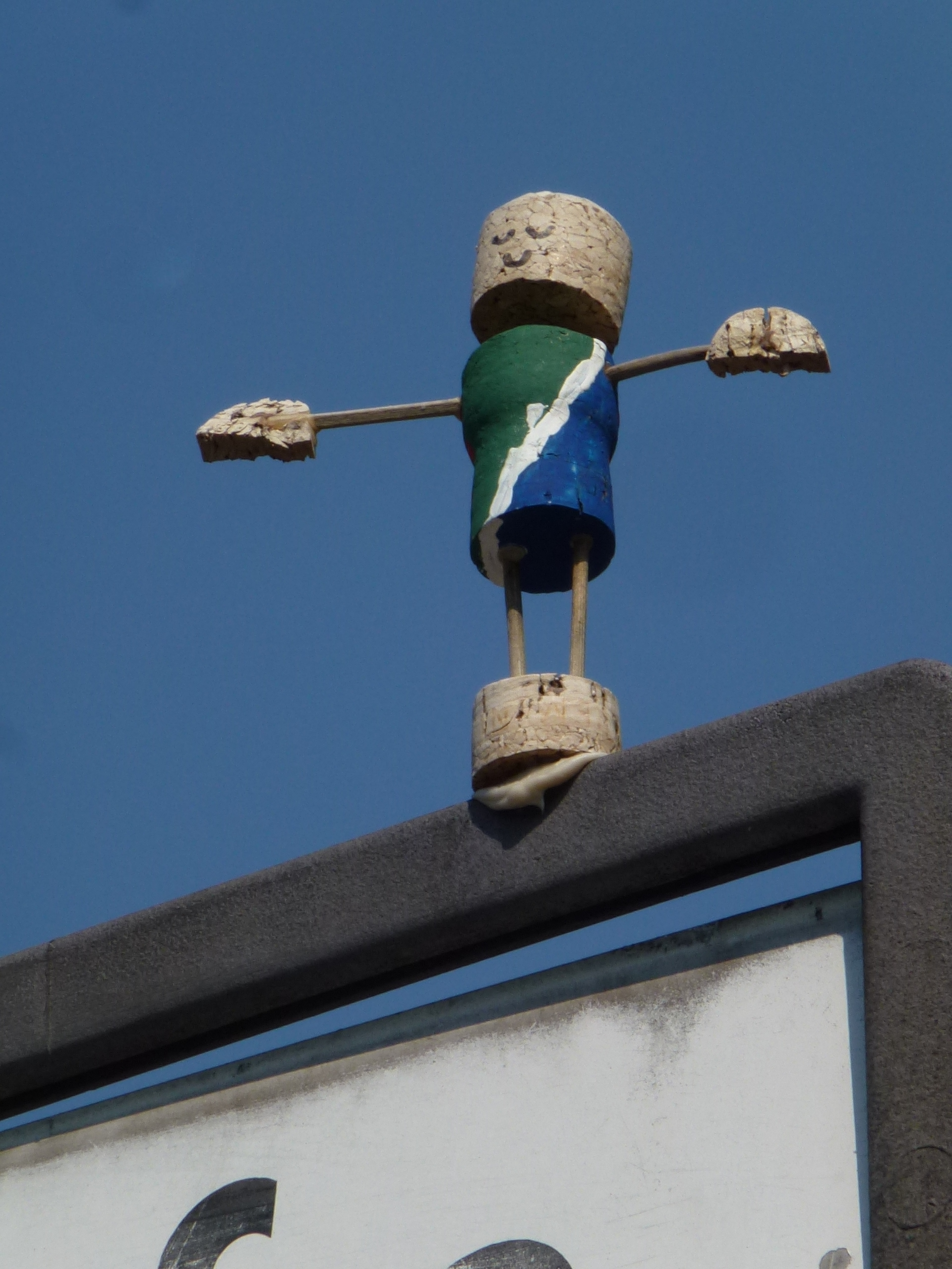 Korkmännchen an der Filanda Ecke Südendstraße in Berlin-Steglitz